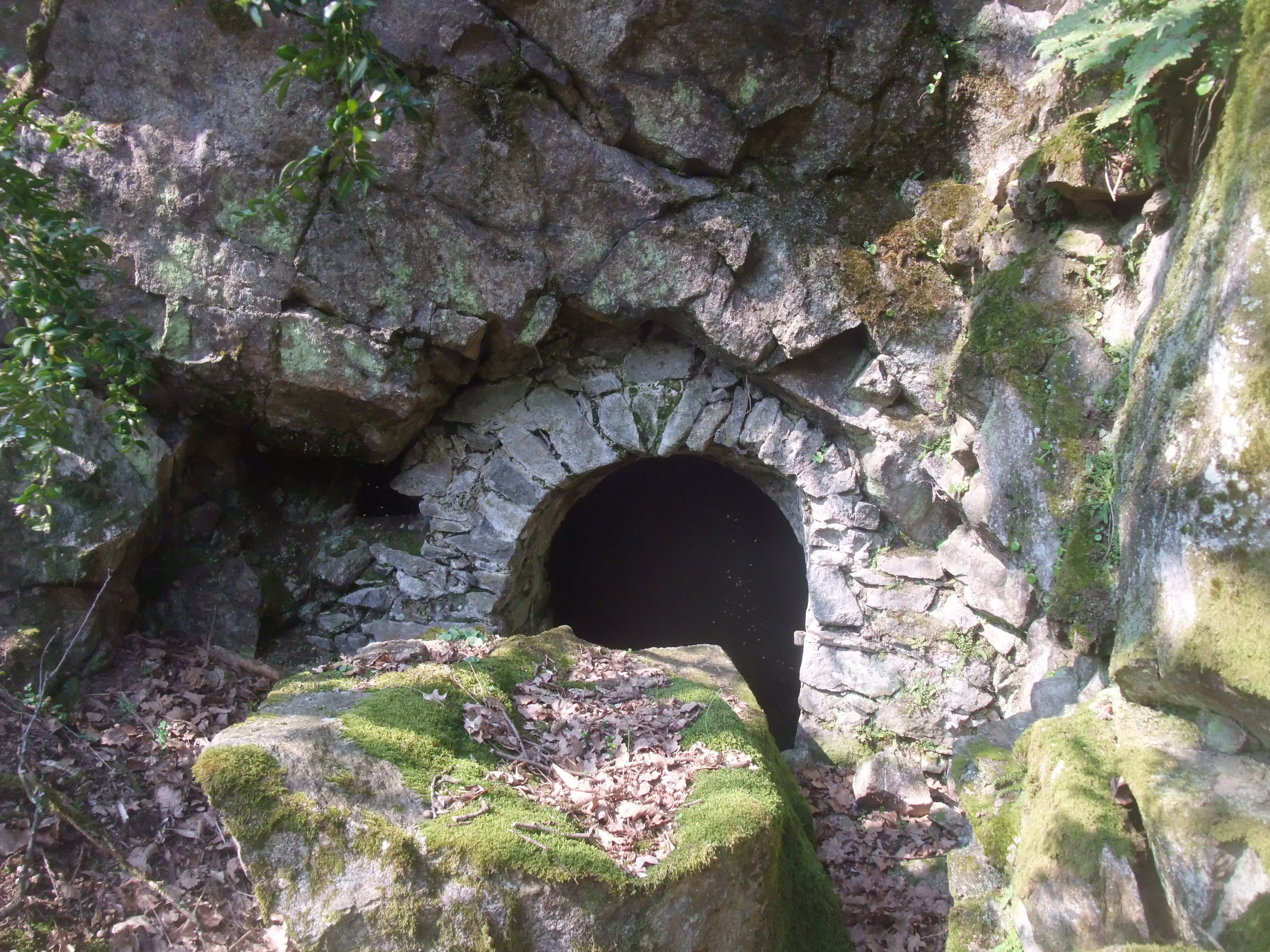 Talencieux mine explosifs